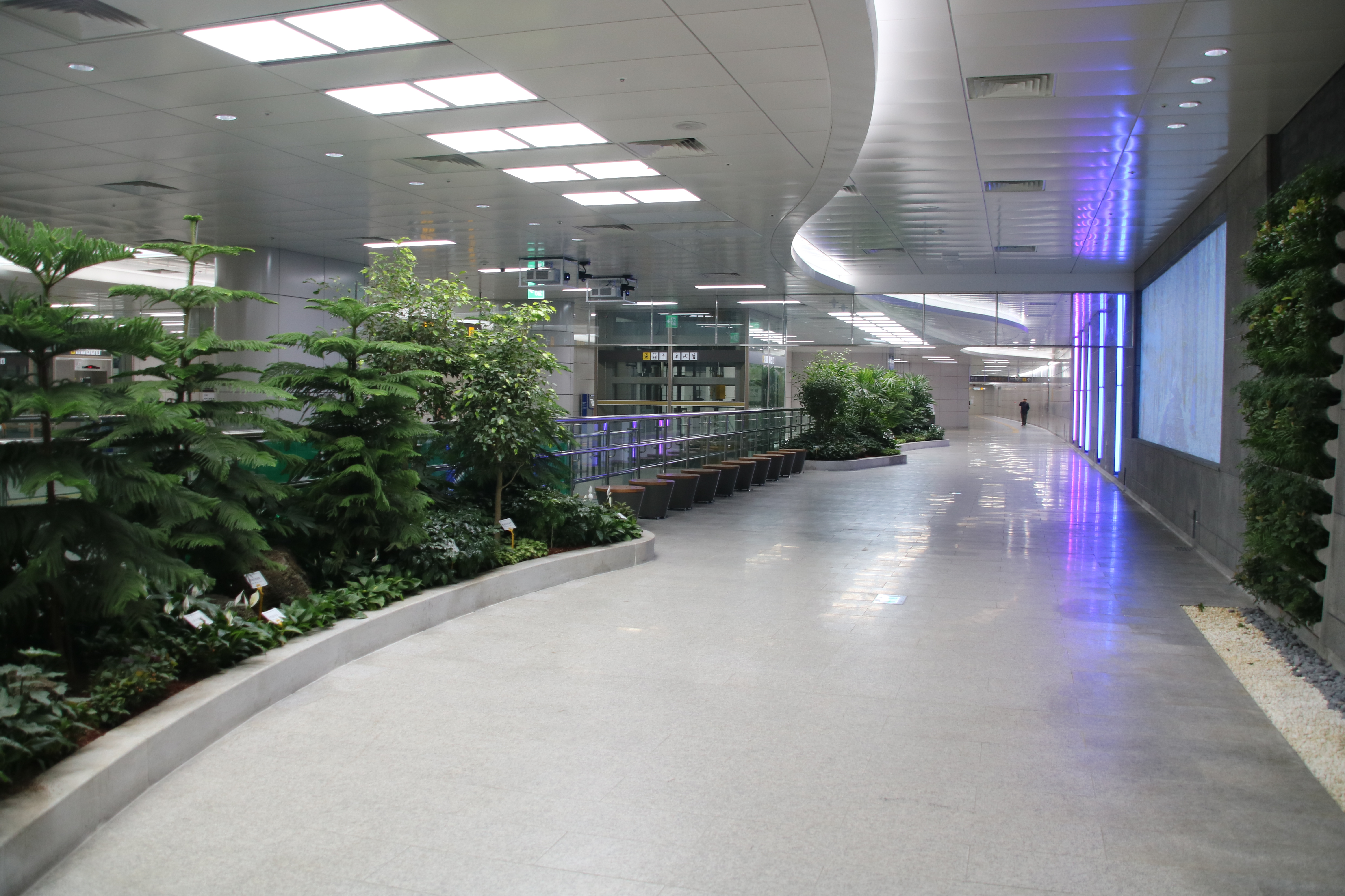 중앙보훈병원역 대합실